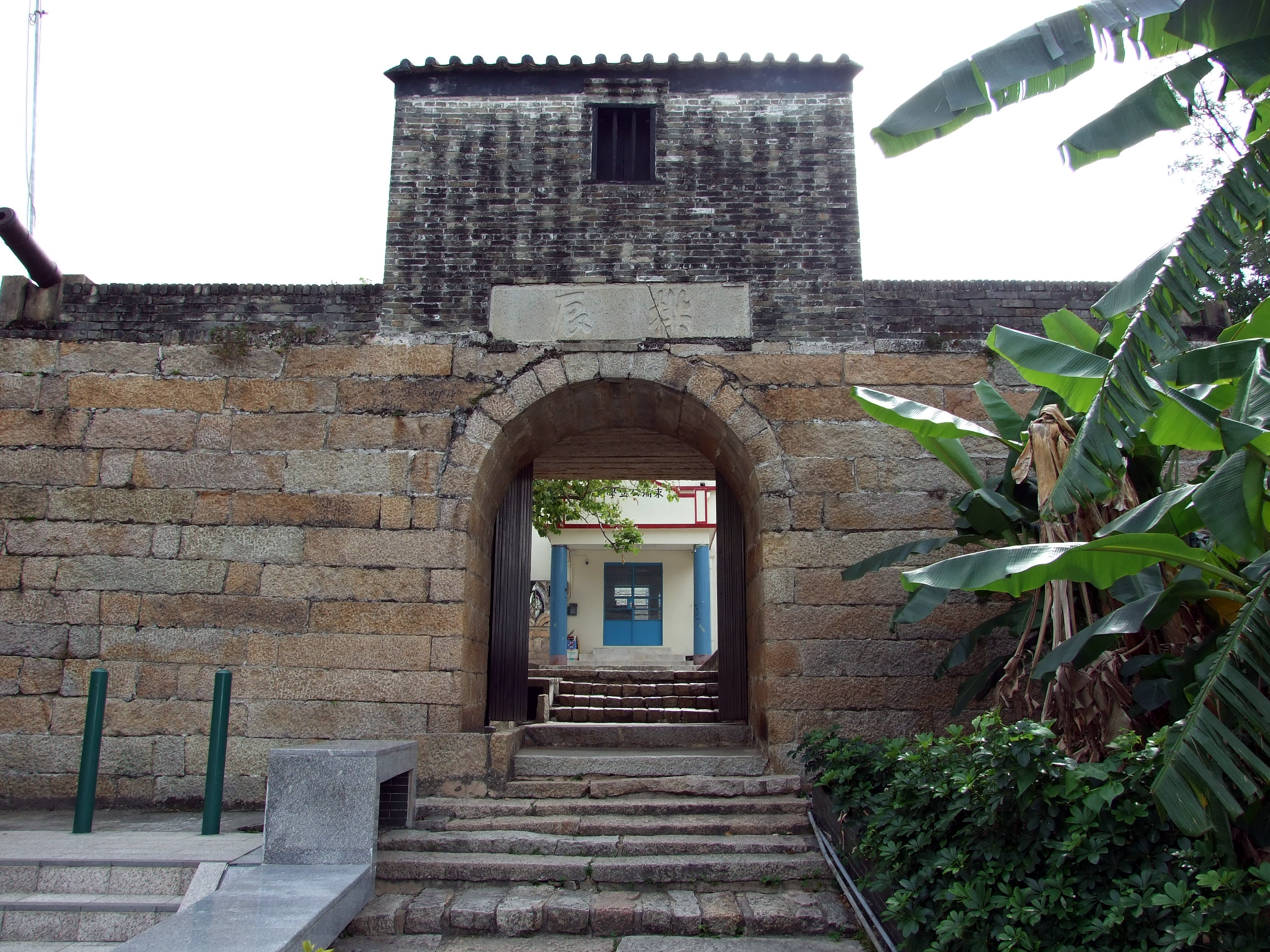 中文（香港）: 東涌炮台正門